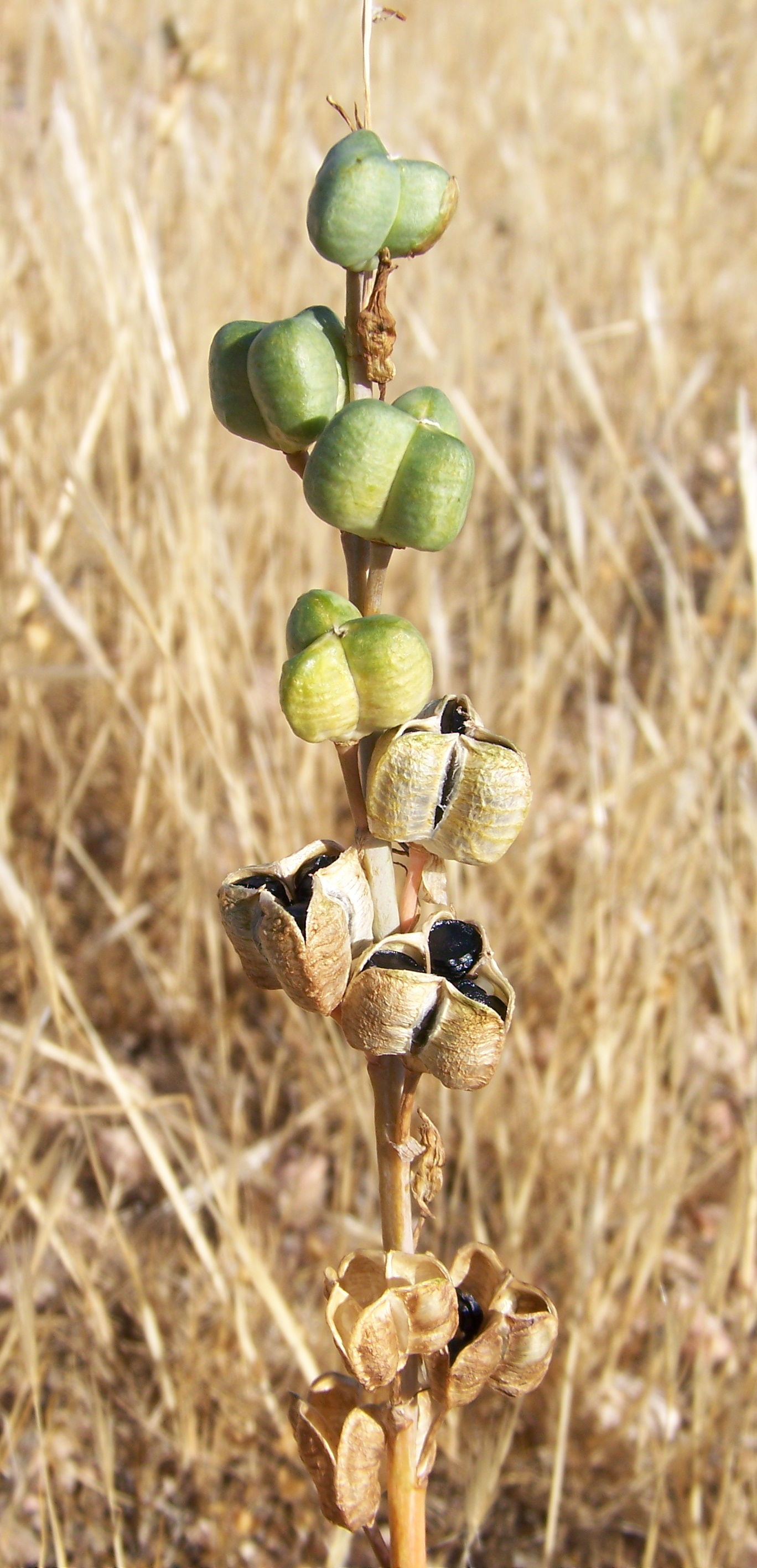 Dipcadi serotinum (Jacinto leonado): frutos maduros, con semillas in situ, en la base del escape, y todavía inmaduros hacía el ápice - Cabezo de los Ojales/de las Fuentes, Albatera (Provincia de Alicante, España).